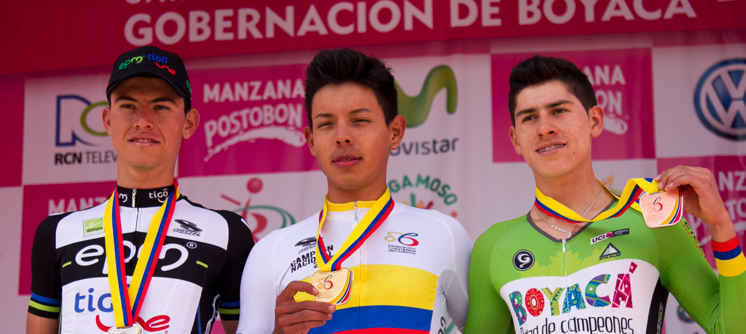 CRI Hombres Sub-23 Campeonatos Nacionales de Ruta Boyacá 2016